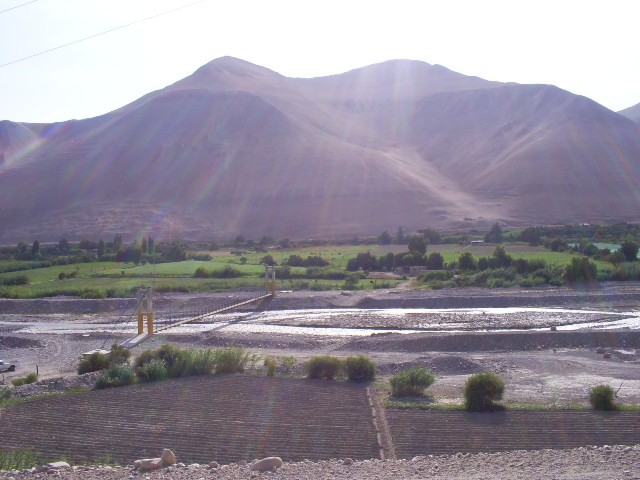 Imagen del Valle de Moquegua, en Perú